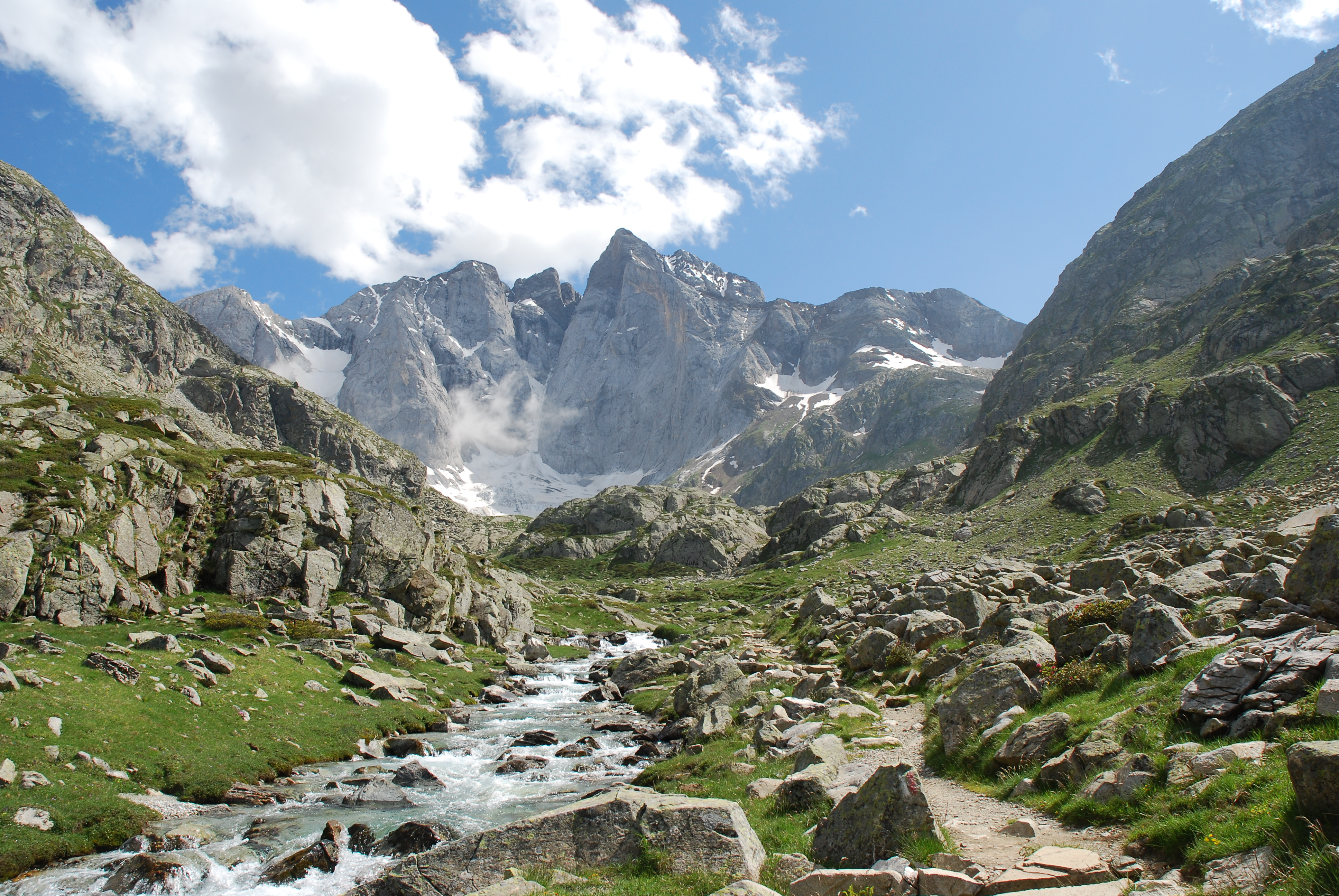 Le Vignemale, le Pique Longue situé à la frontière franco-espagnole dans le massif du Vignemale. Hauteur 3298 m